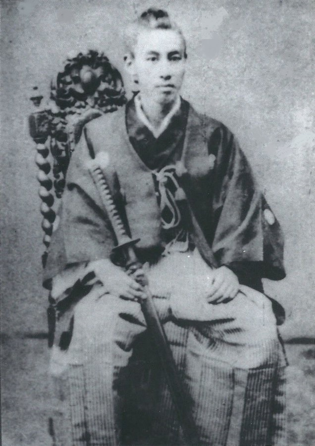 横山常守（横山主税）